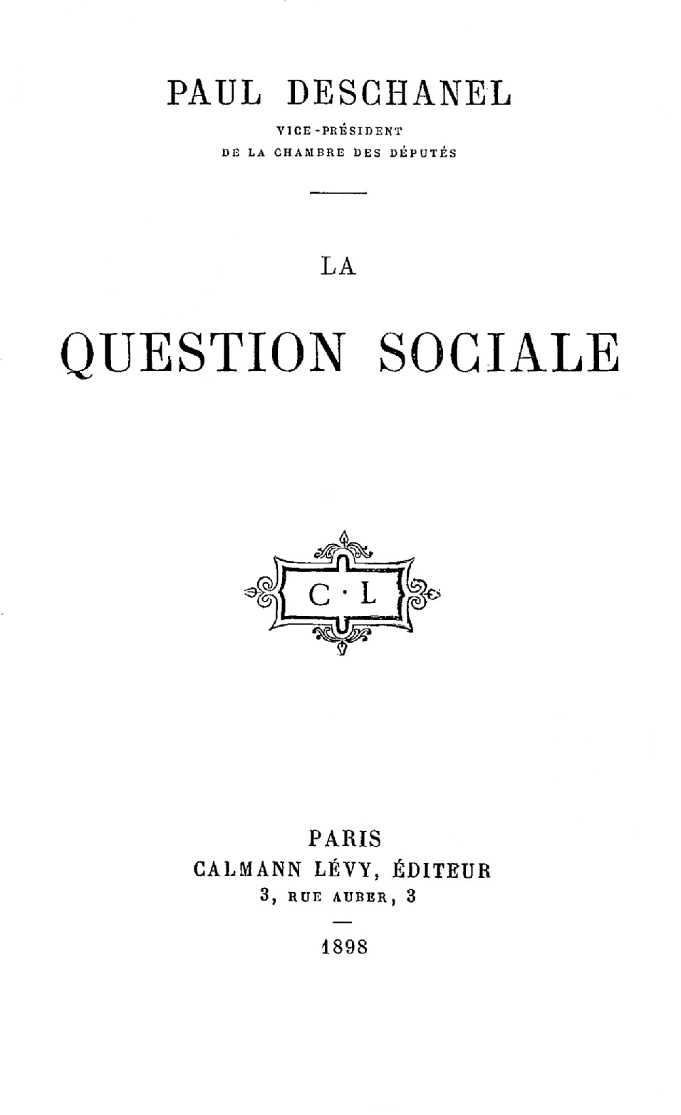 Couverture de La Question sociale, de l'homme politique français Paul Deschanel.